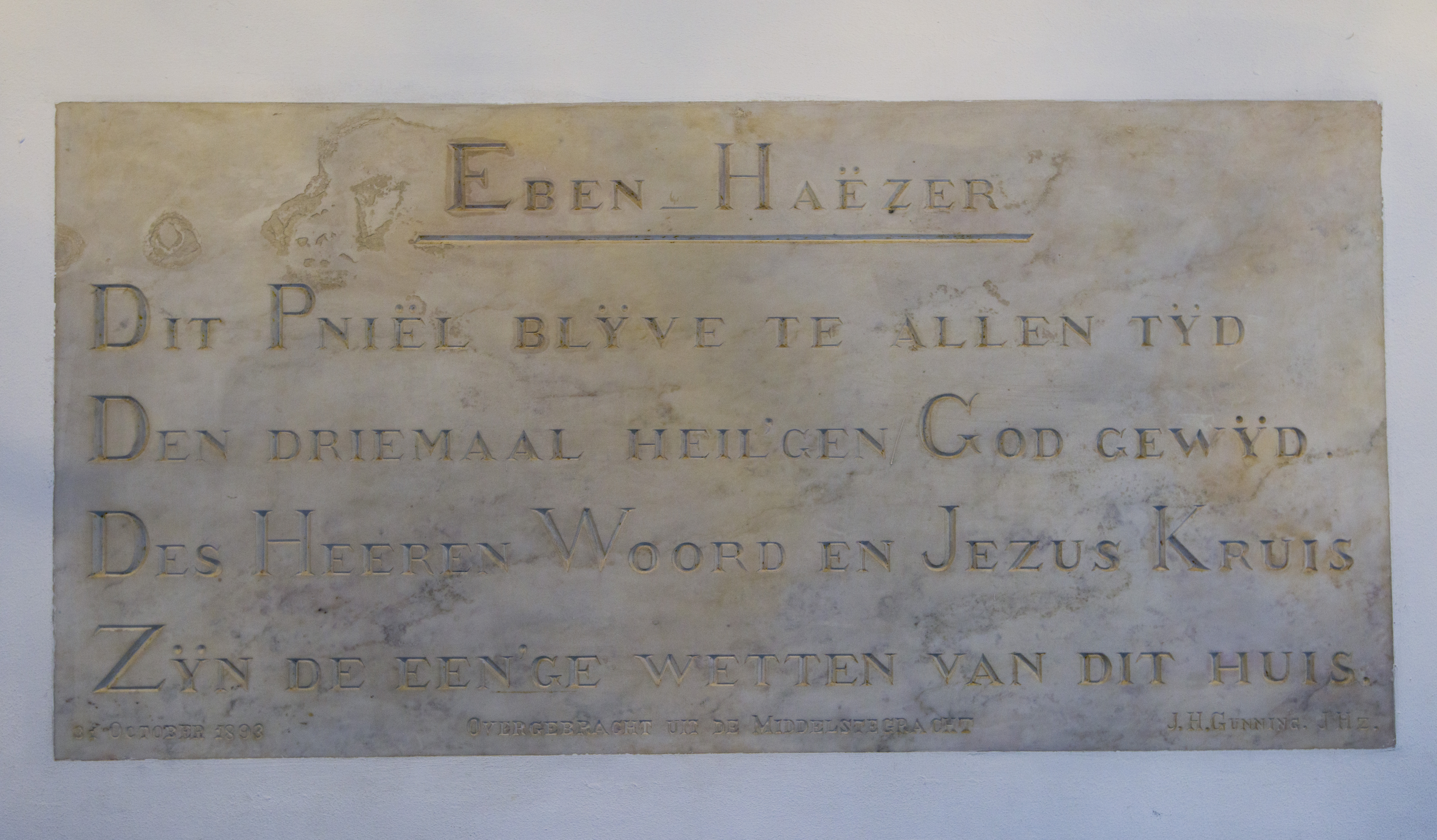 Een Eben-Haëzer oftewel gedenksteen met een religieuze strekking in "Het Hooglandse Huys" te Leiden. Eben-Haëzer ------------ Dit Pniël blyve te allen tyd Den driemaal heil'gen God gewyd. Des Heeren Woord en Jezus Kruis Zyn de een'ge wetten van dit huis 31 October 1893 Overgebraght uit de Middelste gracht J.H. Gunning. JHz.